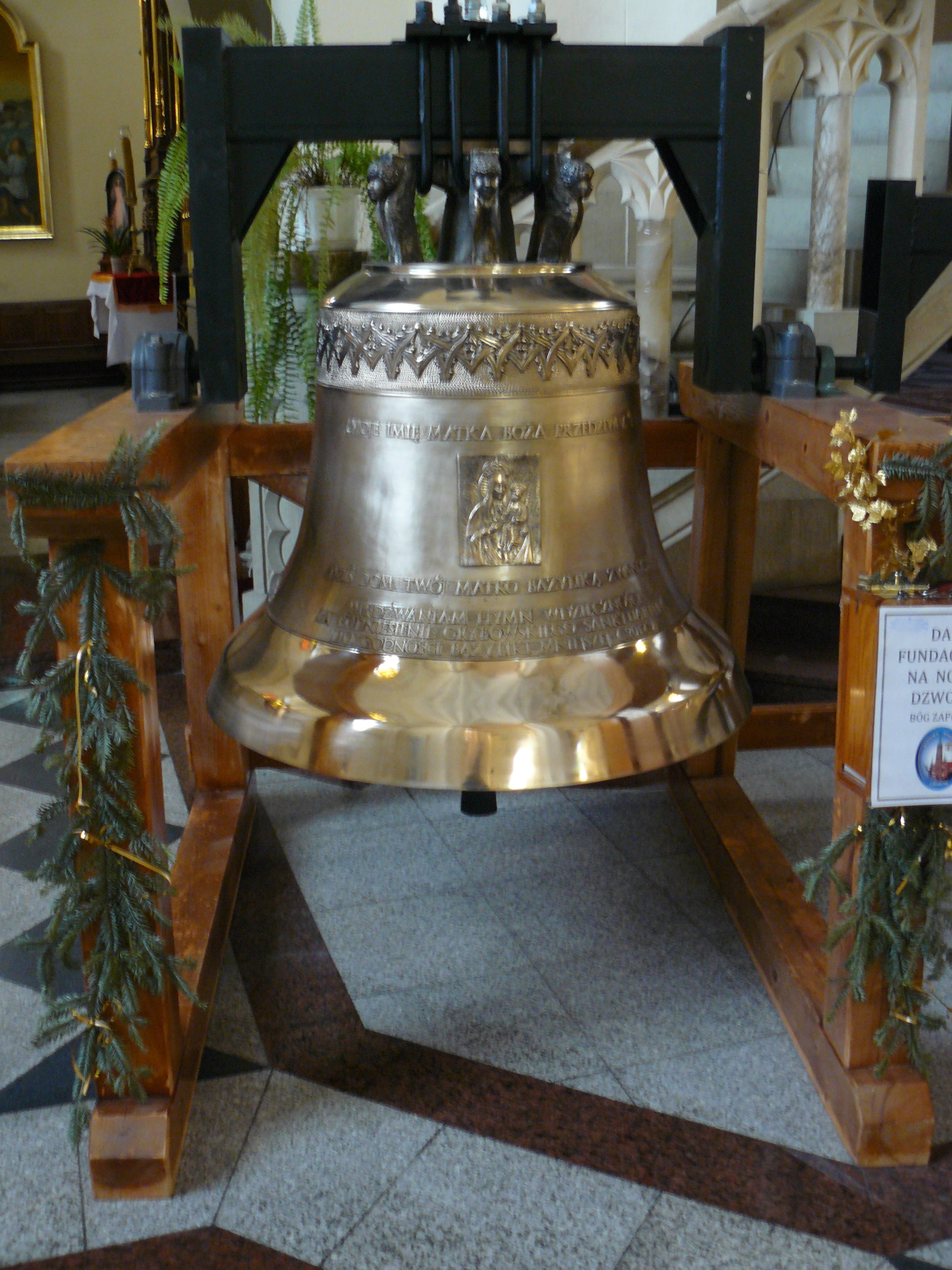 Bazylika Mniejsza pw. św. Katarzyny Aleksandryjskiej w Grybowie, nowy dzwon, nazwany „Matka Boża Przedziwna” (800kg).